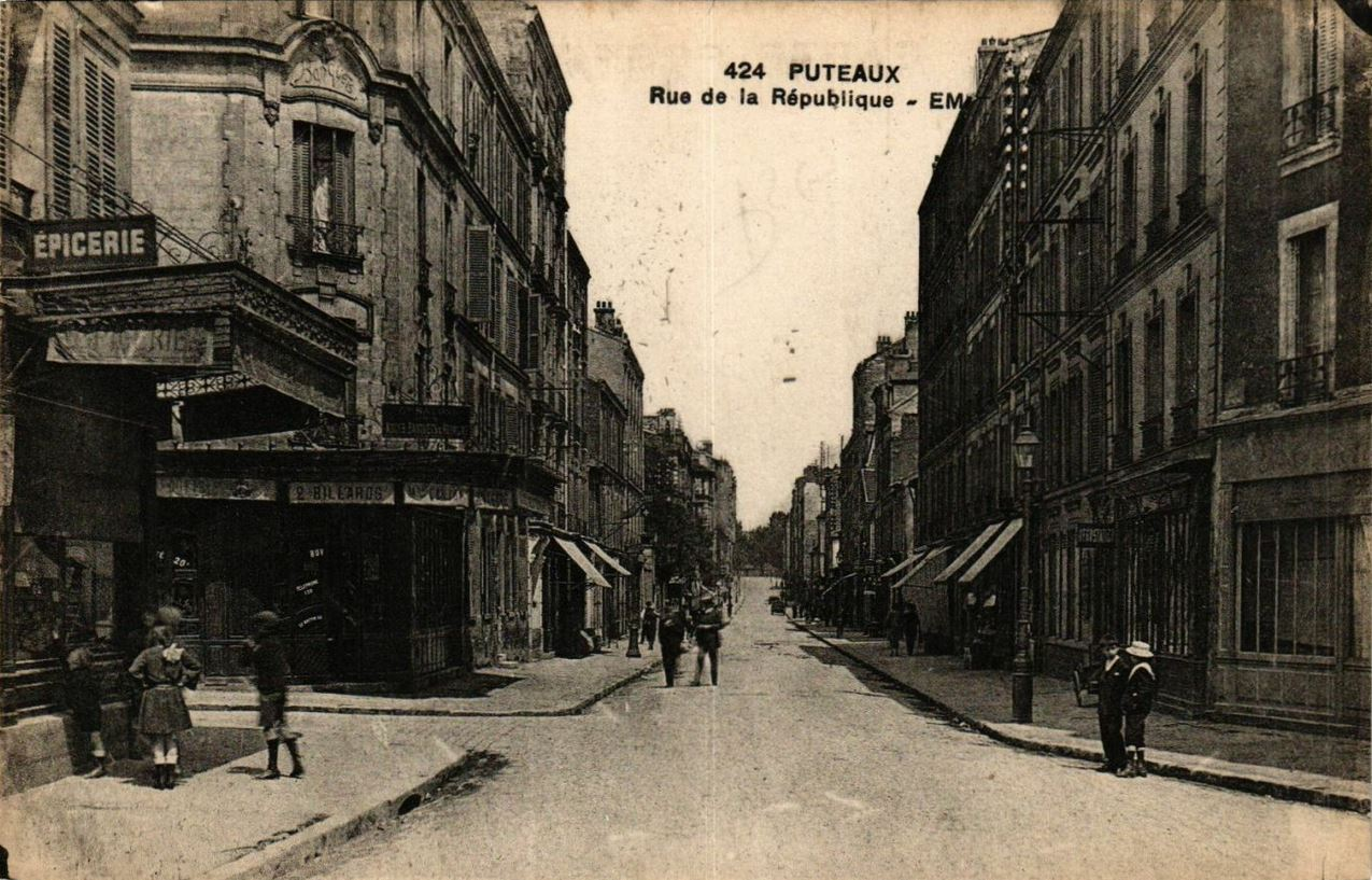 Puteaux.Rue de la République.Perspective